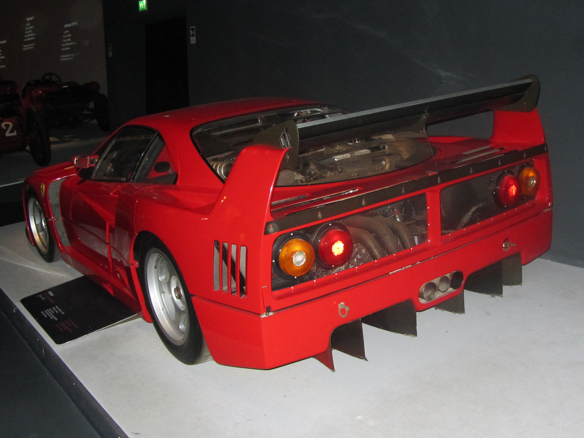 il modello di serie è nato nel 1987 e aveva 478cv; questa versione "Competizione" dispone di 700cv. Ferrari F40 (competizione), Italia: Motore: 8 cilindri a V di 90° Cilindrata: 2.936 cmc Potenza: 700 cv Museo dell'automobile di Torino donato da Galleria Ferrari, Maranello